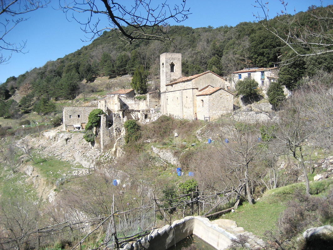 Poble de Lliurona, al terme d'Albanyà (Alt Empordà), Catalunya. Lliurona